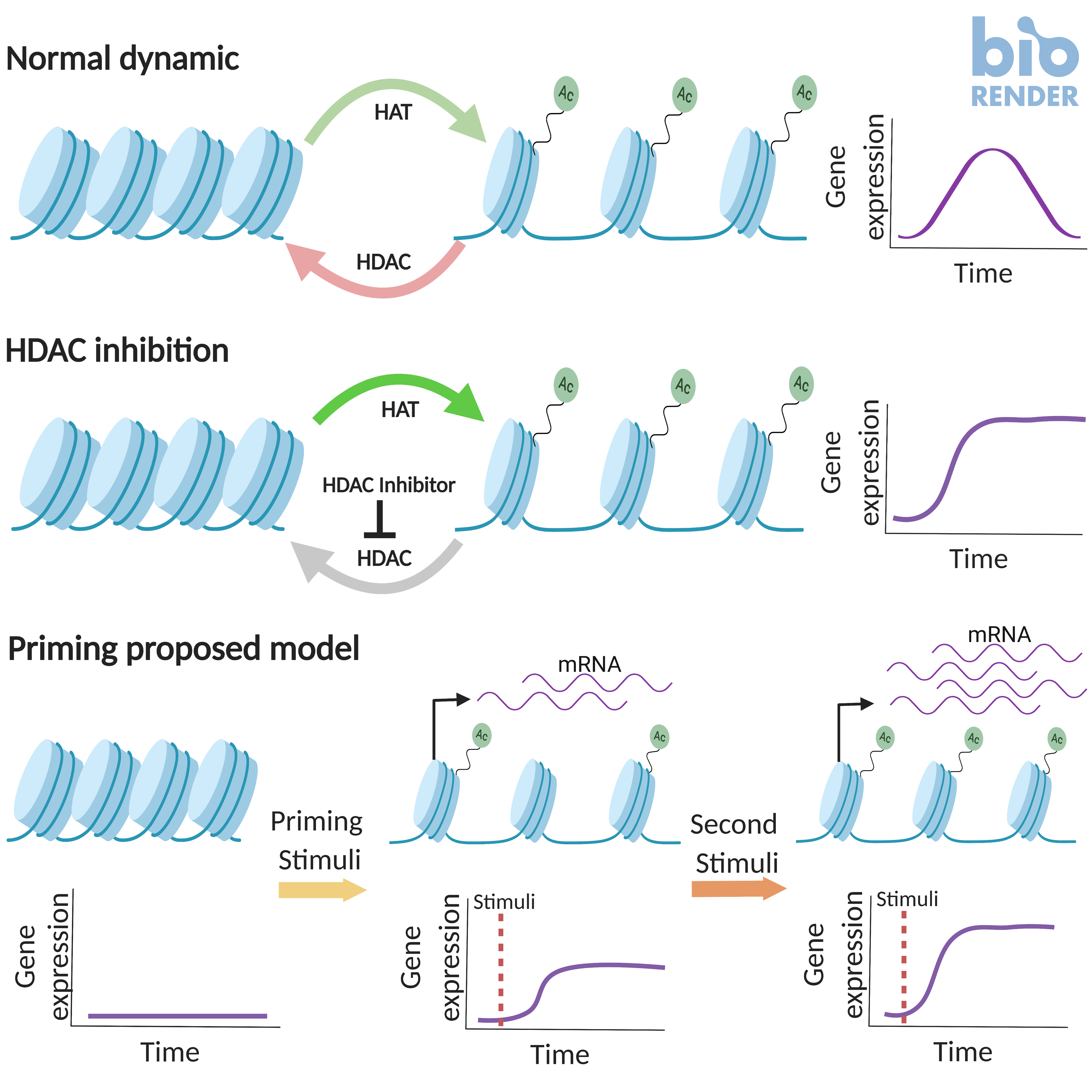 Modelo general propuesto para priming epigenético